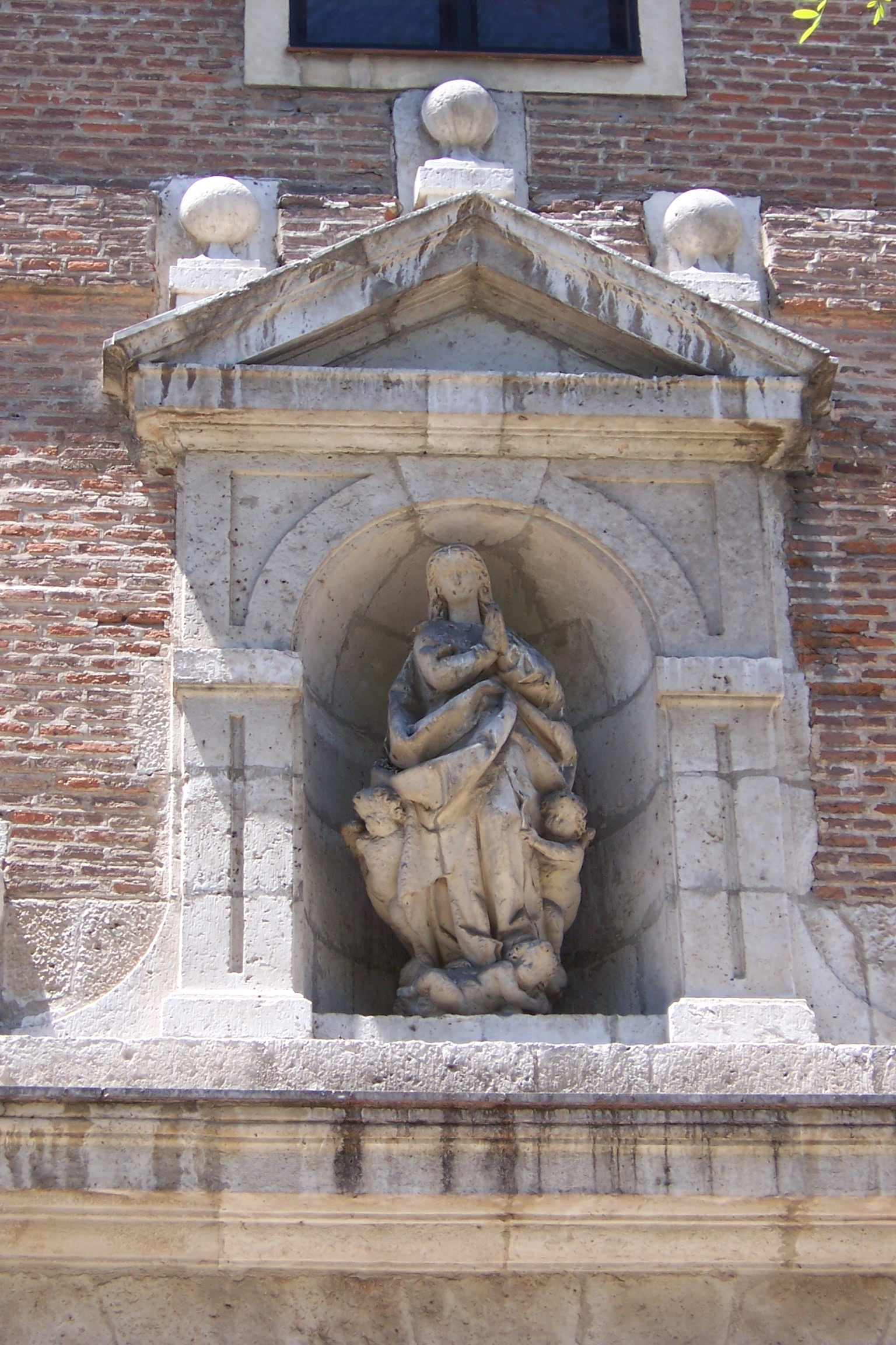 Convento de las Descalzas Reales de Valladolid (España). Imagen en piedra de la portada atribuida a Gregorio Fernández.